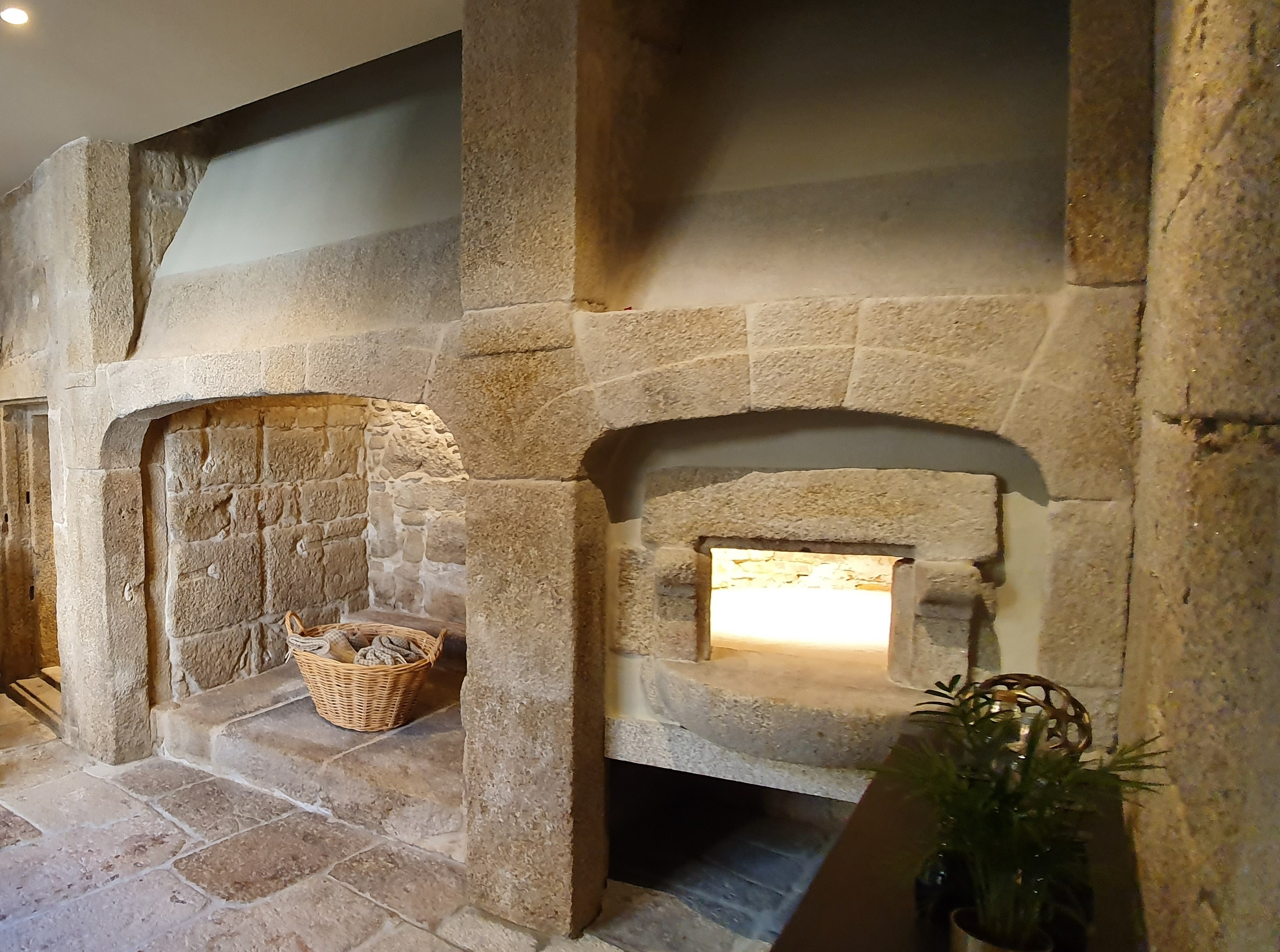 Casa dos Maias Dawny piec